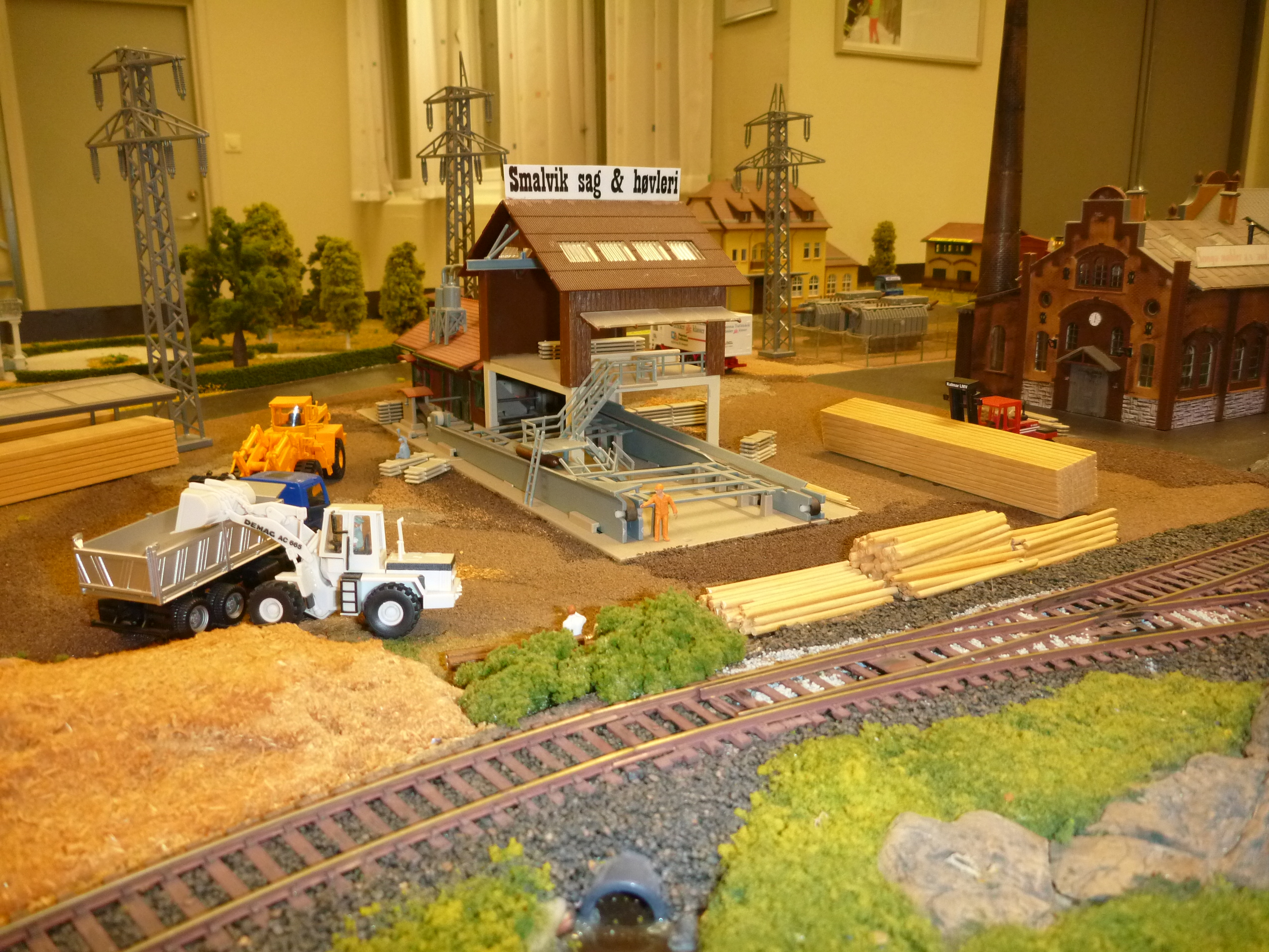 Smalvik sag & høvleri, ved inngangsporten til Smalvik industriområde